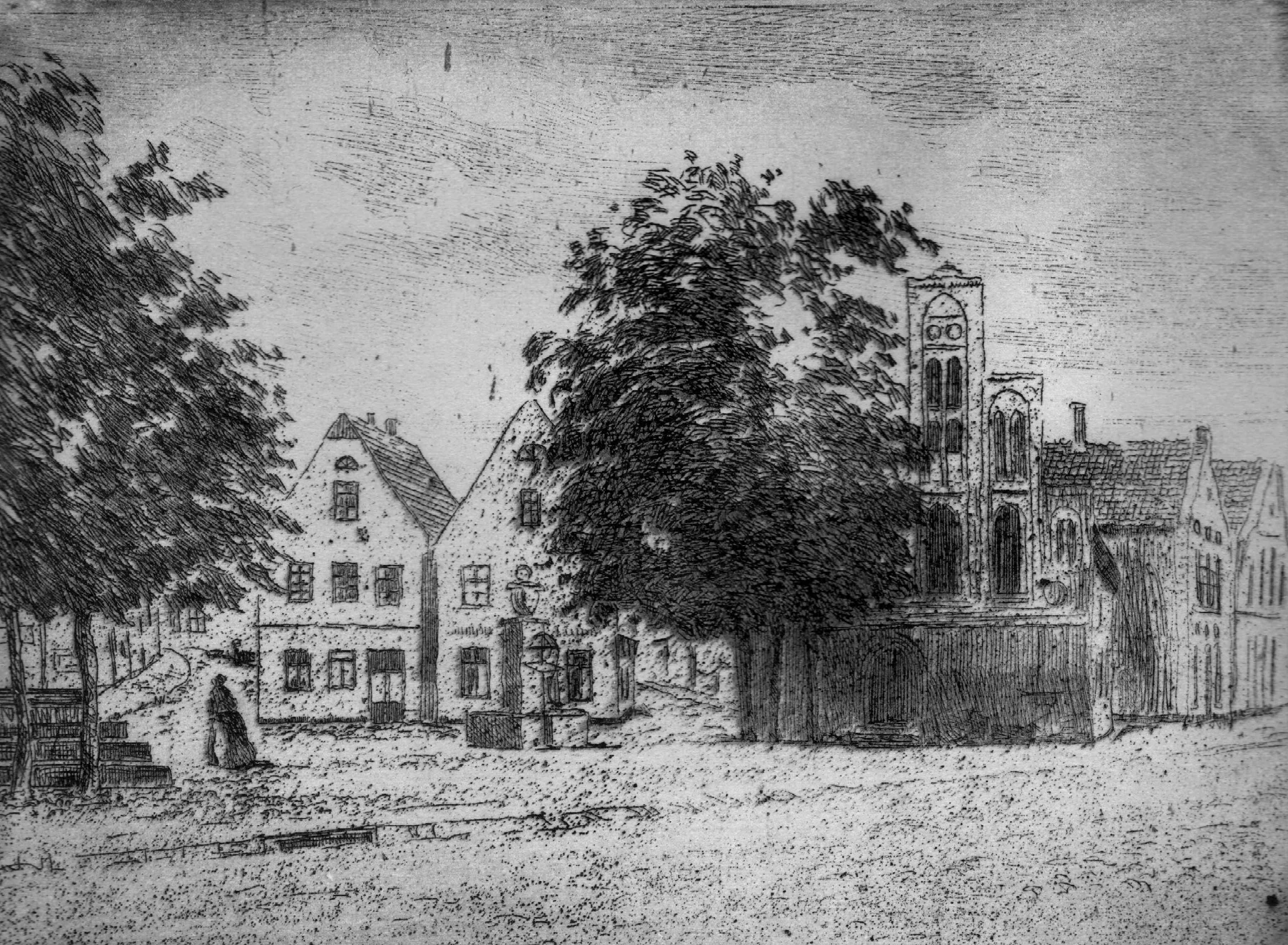 Heinz Witte-Lenoir – Marktplatz Wildeshausen